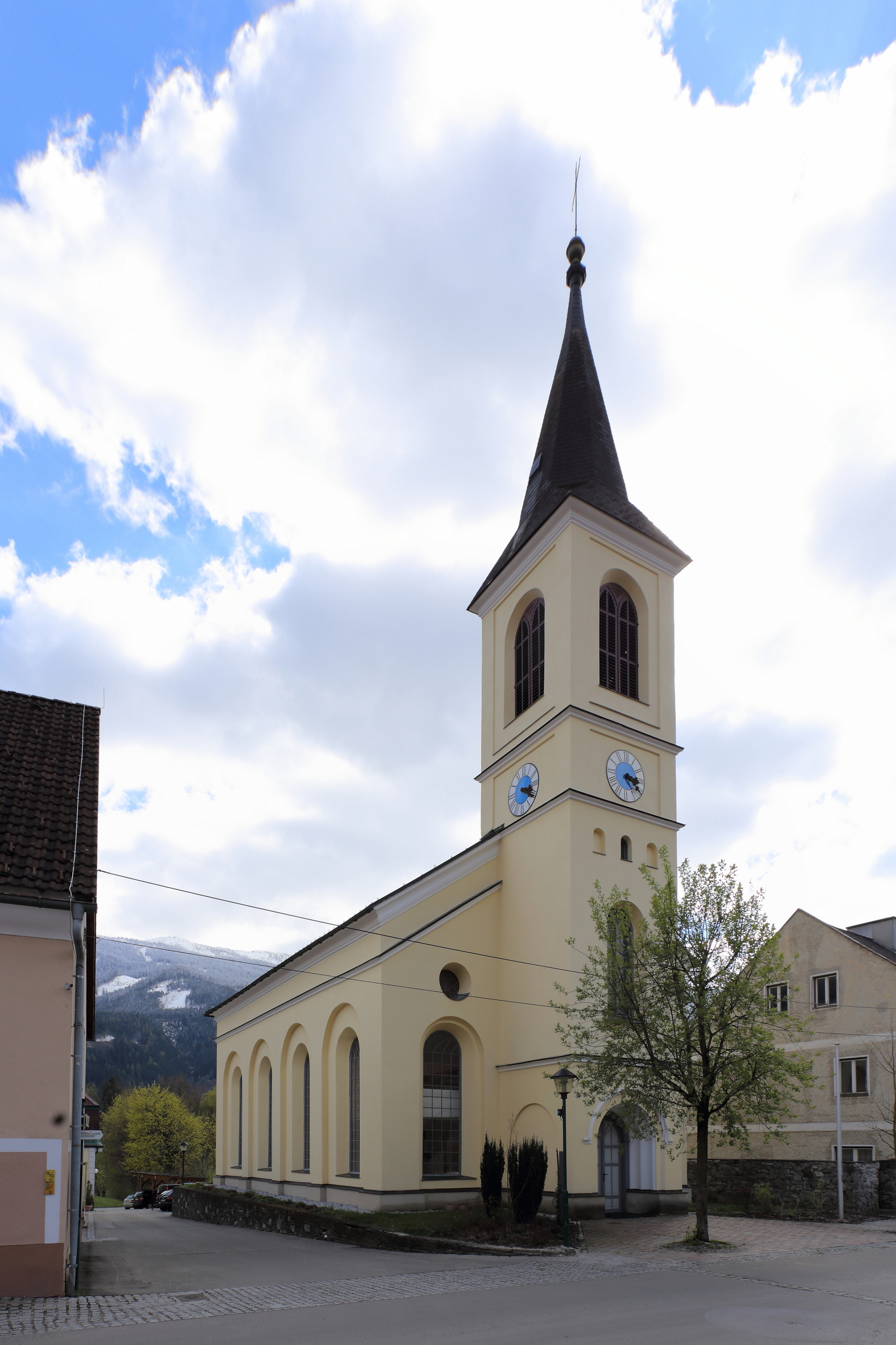 Die evangelische Pfarrkirche in der steiermärkischen Marktgemeinde Gaishorn am See.